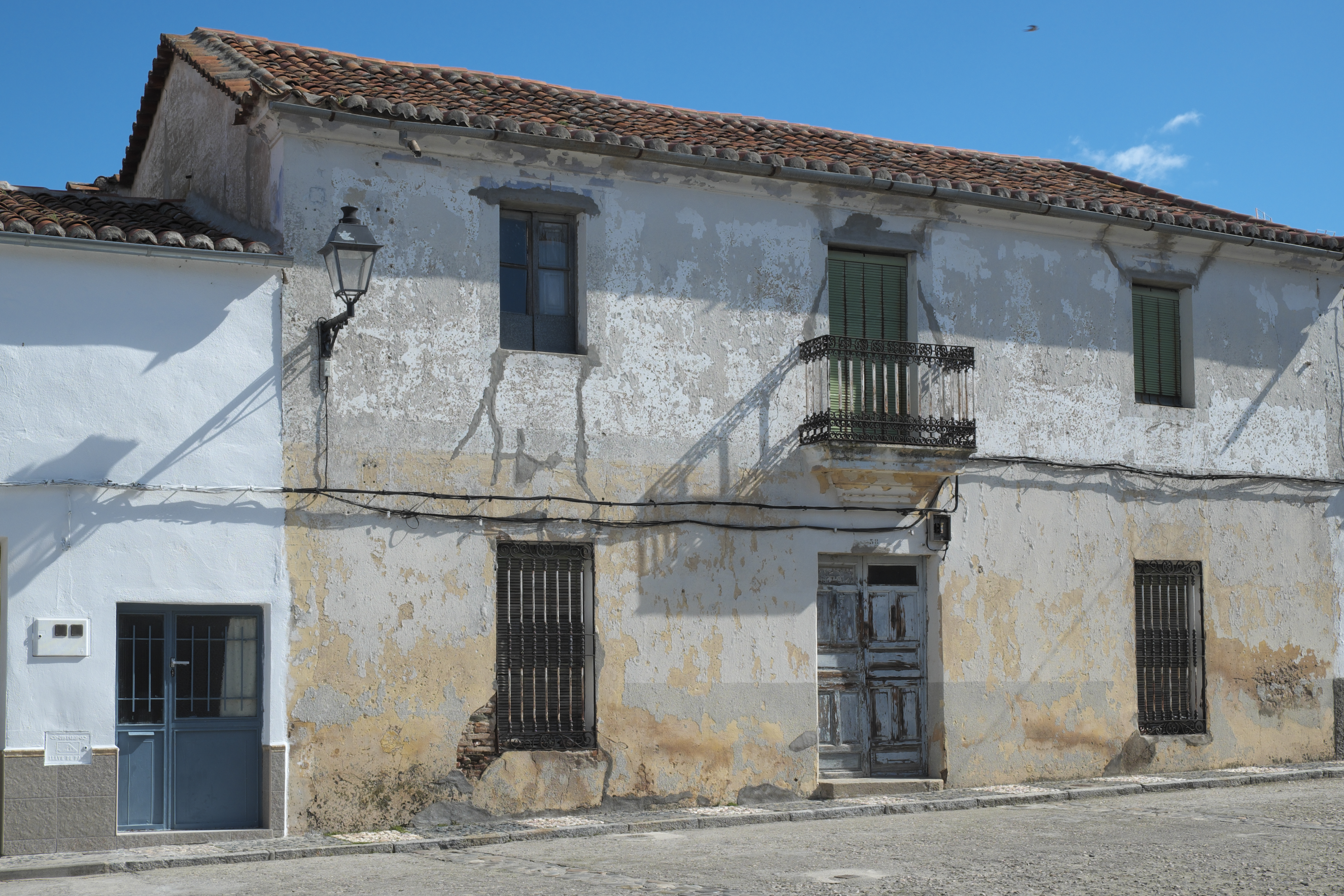 Haus in Galisteo in der Provinz Cáceres (Extremadura/Spanien)